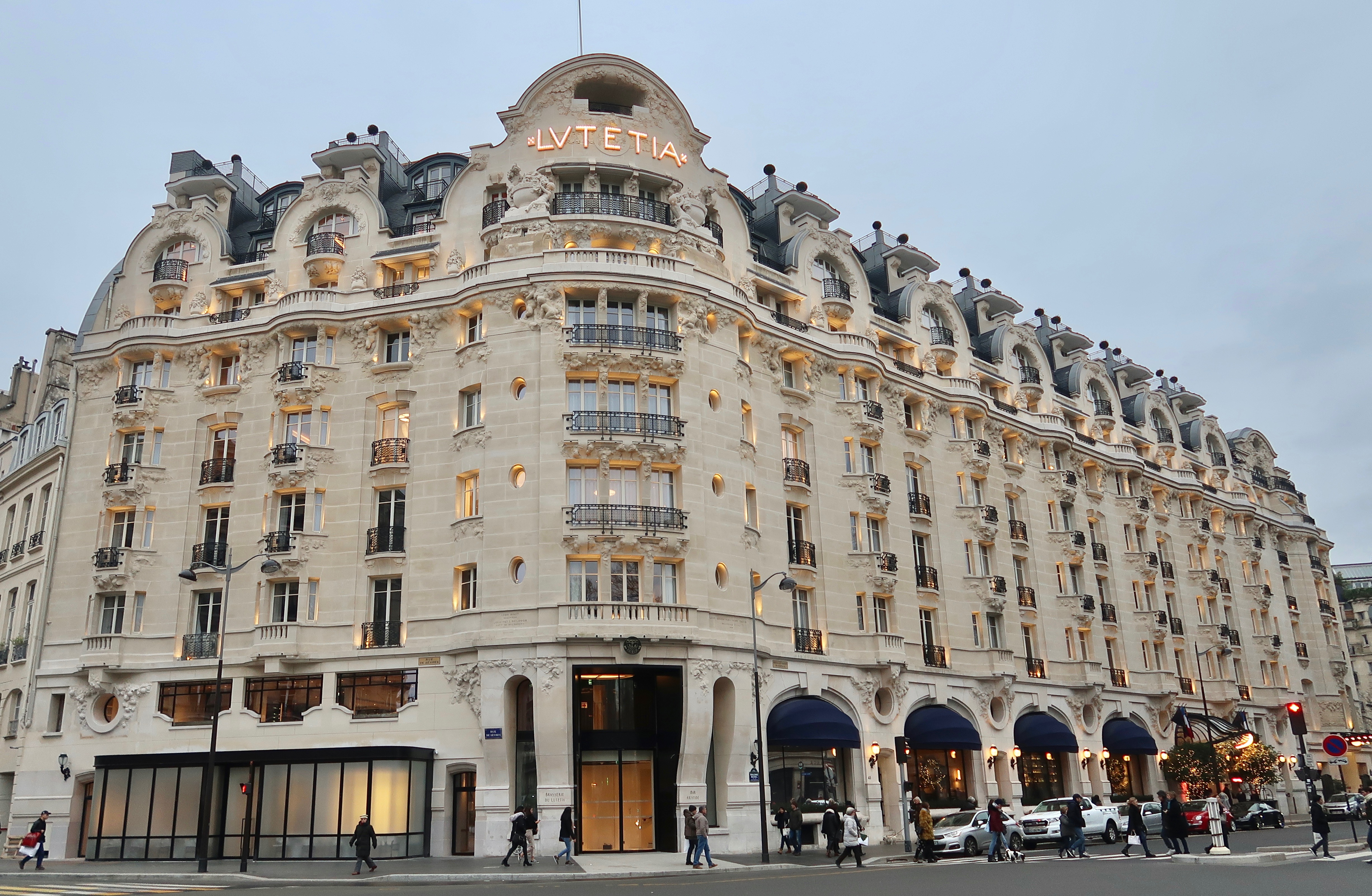 Hôtel Lutetia, 23 rue de Sèvres (Paris, 6e).